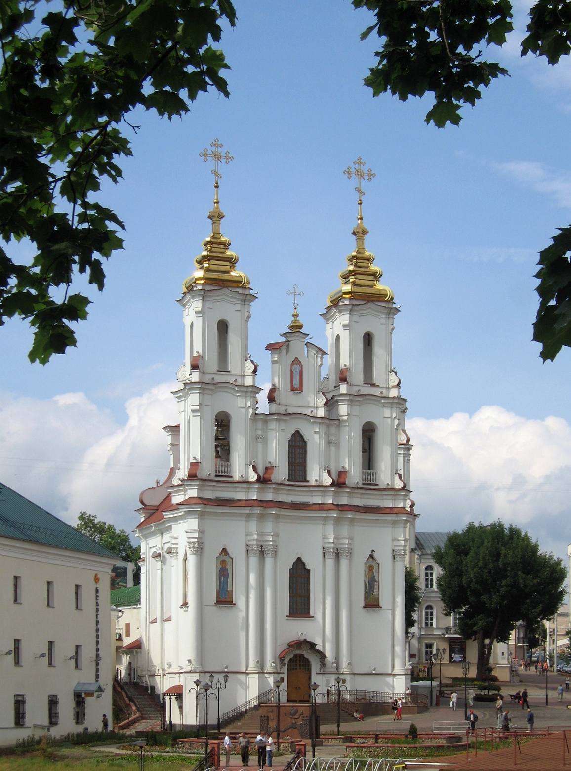 Беларуская (тарашкевіца): Сьвята-Васкрасенская царква. г. Віцебск This is a photo of Belarusian heritage monument. Reference number: 212Г000086 ( WLM)